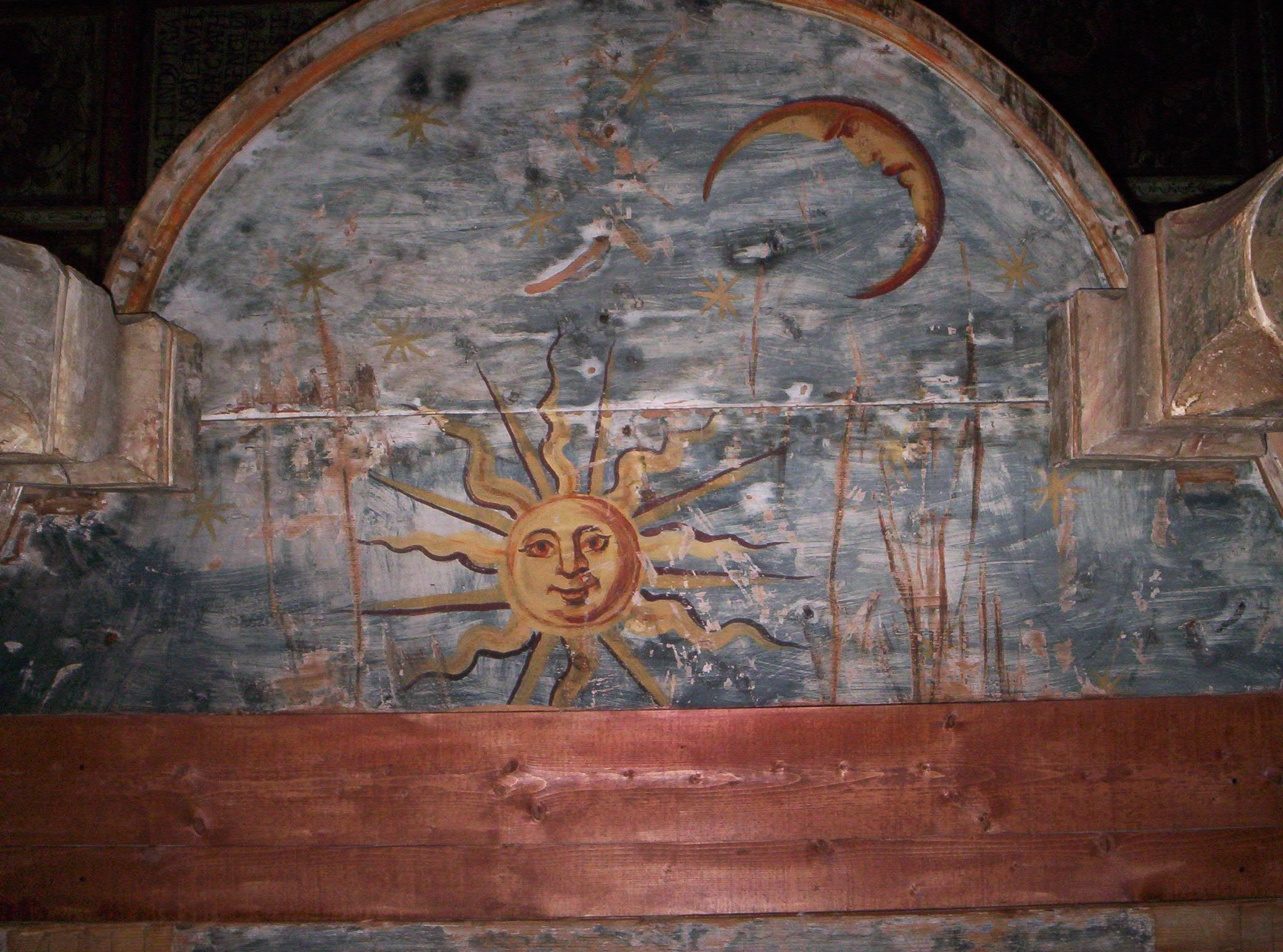 A gelencei Szent Imre-templom (székely szimbólumok a szószék alsó borításán) – photo taken by uploader User:Csanády in 2006.